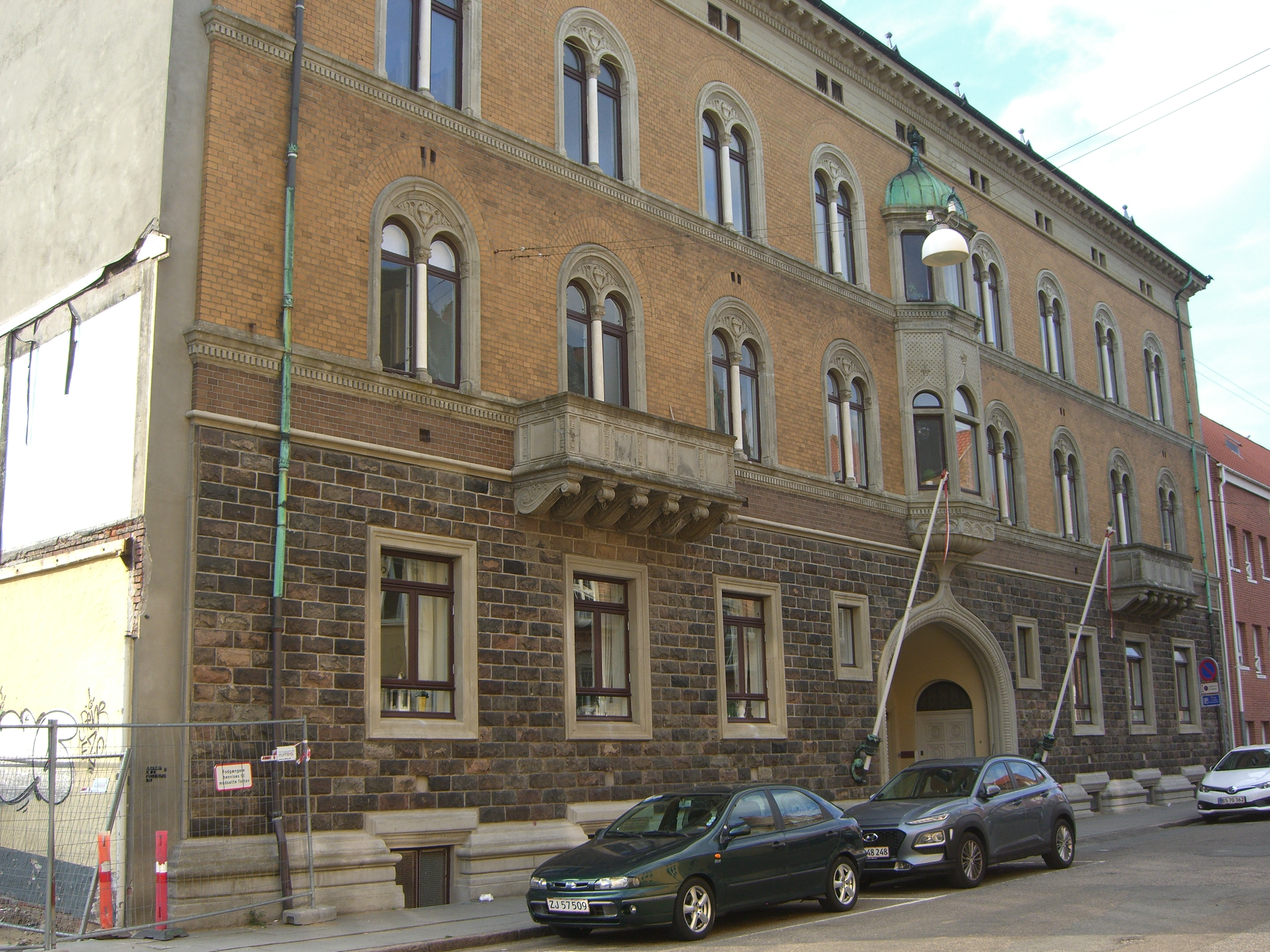 Østergade 4, Esbjerg